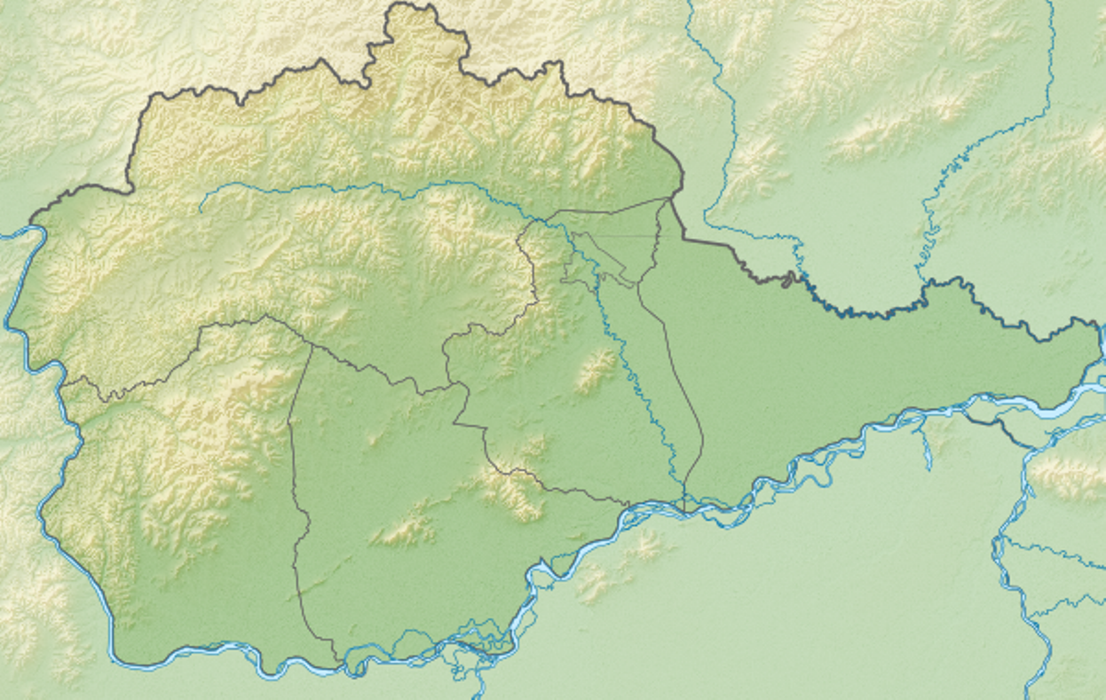 Физическая карта Еврейской автономной областиКоординаты краёв: север — 49.5° С юг — 47.6° С запад — 130.5° В восток — 135.0° В